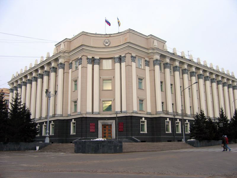 Здание Народного Хурала и администрации Президента Бурятии